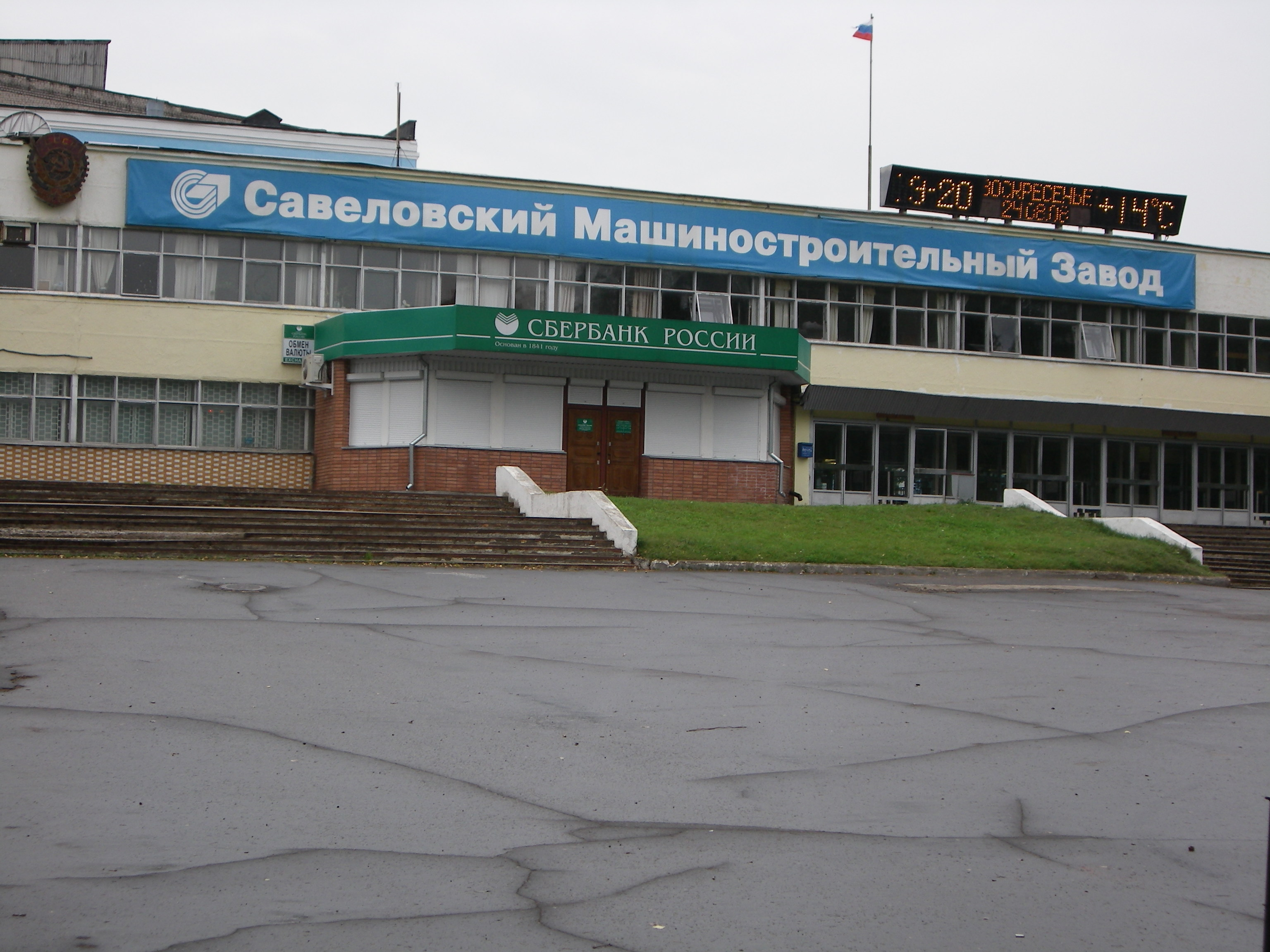 Maŝinkonstruada fabriko en Savjolovo